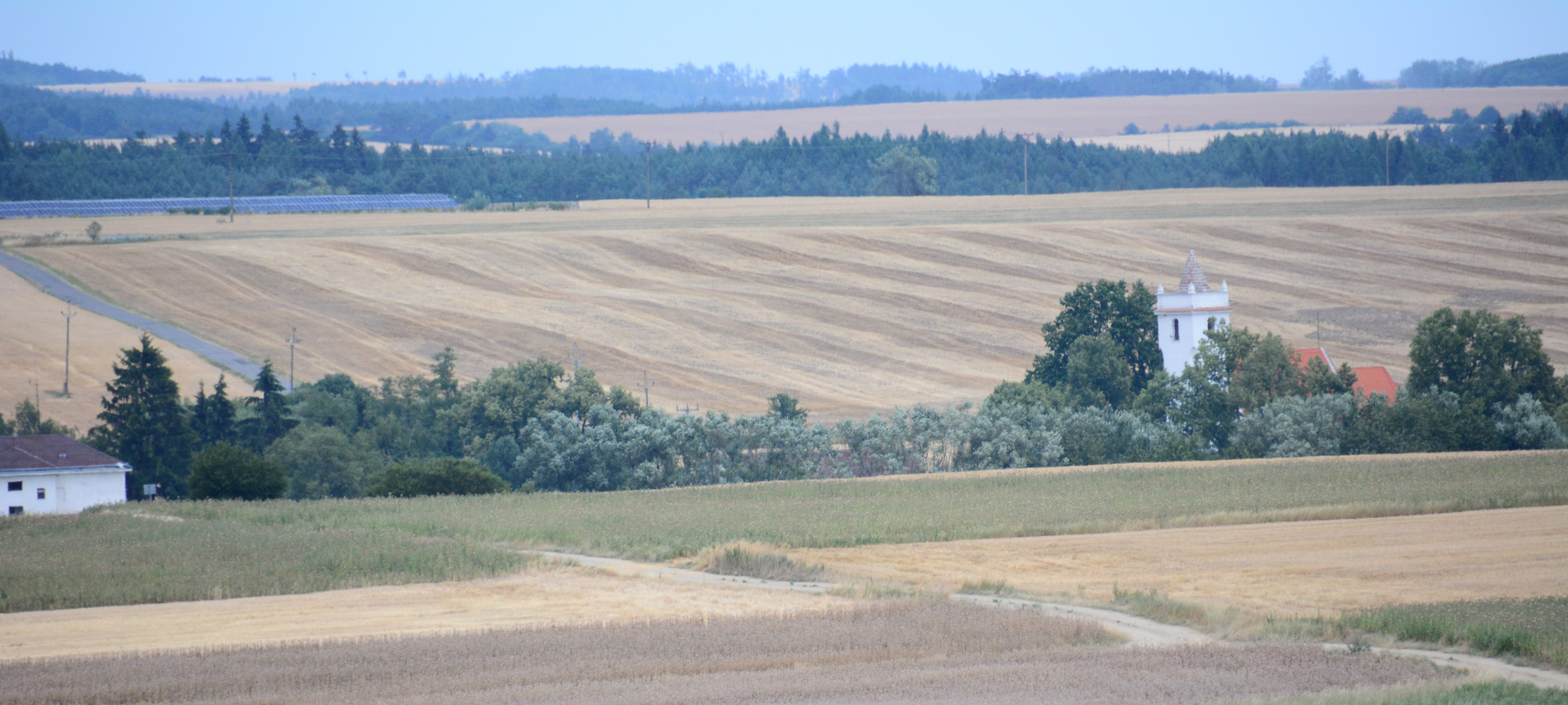 Stálky / Stallek in Südmähren (Tschechische Republik) von der Gedenkstätte Stallek (Heinrichsreith) aus gesehen